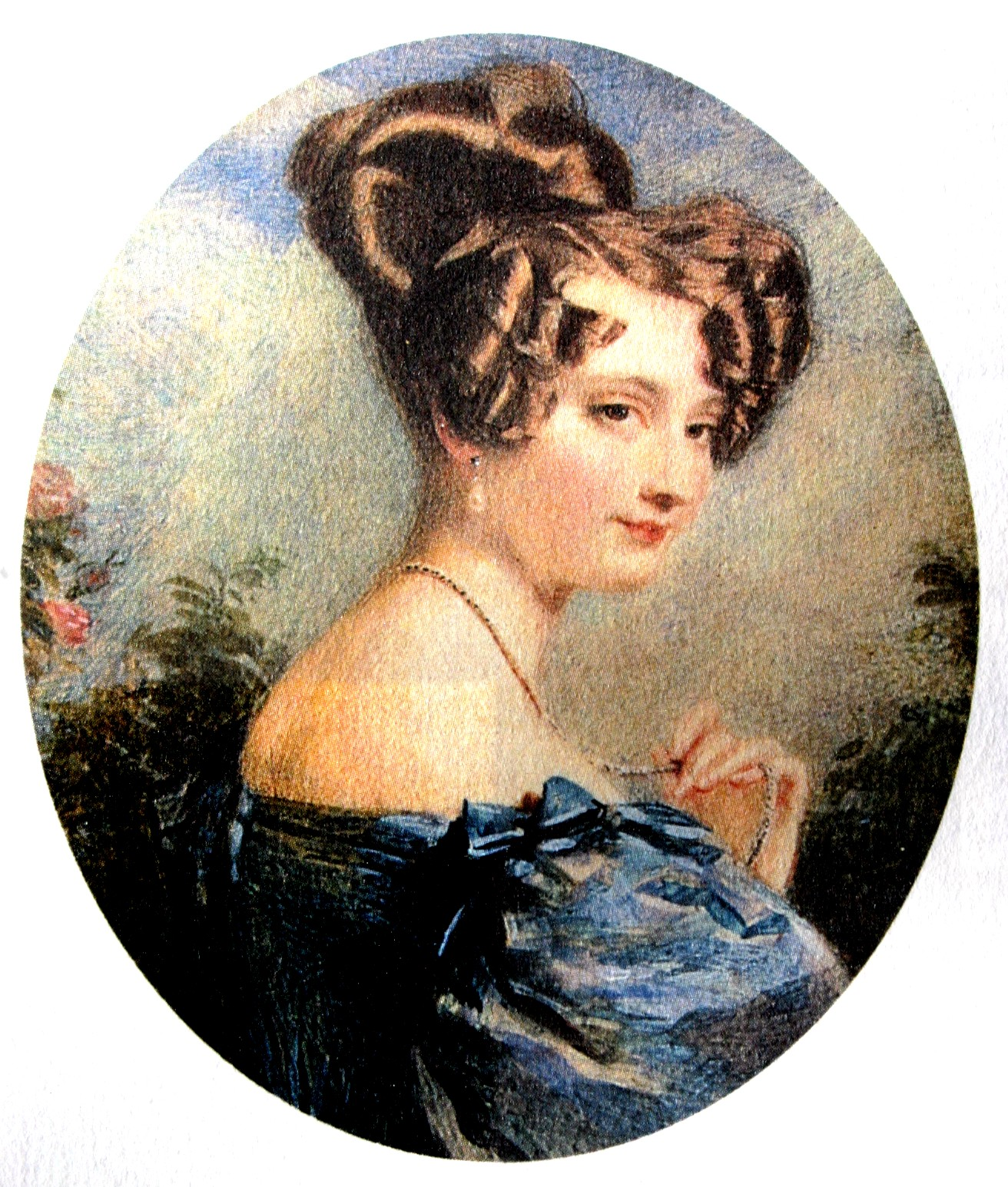 Margaret Herschel (Margaret Brodie Stewart) (1810-1864) wife of John Herschel, astronomer